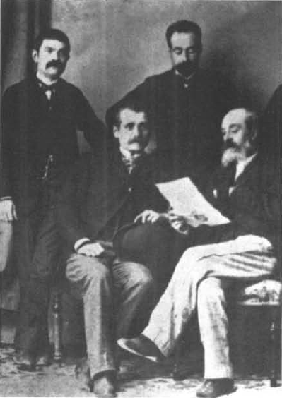 Miembros de la Junta Carlista del distrito de Igualada. De izquierda a derecha: José Bisbal, José Closa Puig, Ramón Martí Rodó y Carlos Puget Grases.